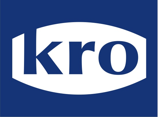 Logo d' chaine télé publique Néerlandais KRO